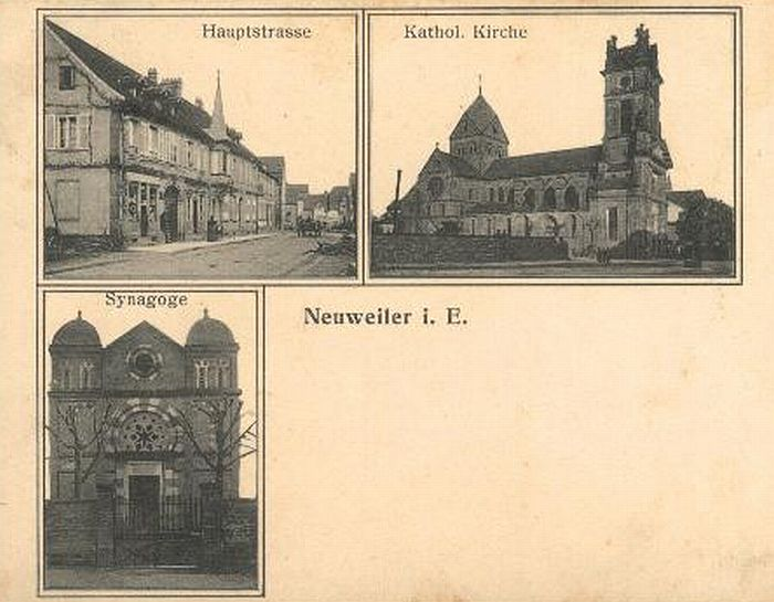 Ansichtskarte von Neuwiller-lès-Saverne im Elsass